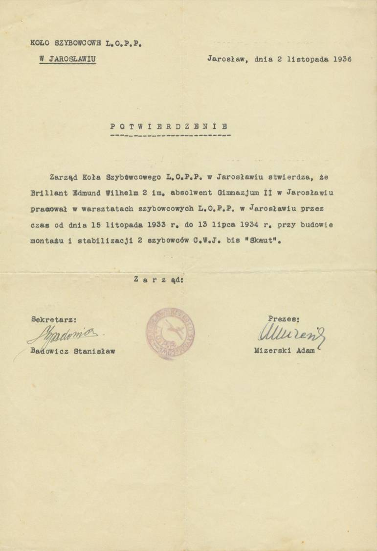 koło szybowcowe w Jarosławiu stwierdza, że Edmond Wilhelm Brillant pracował przy budowie i stabilizacji szybowców "Skaut"